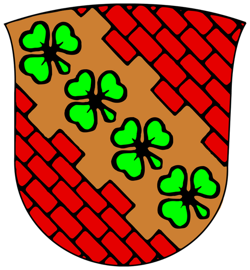 Shield of Høje-Taastrup Municipality (2007)